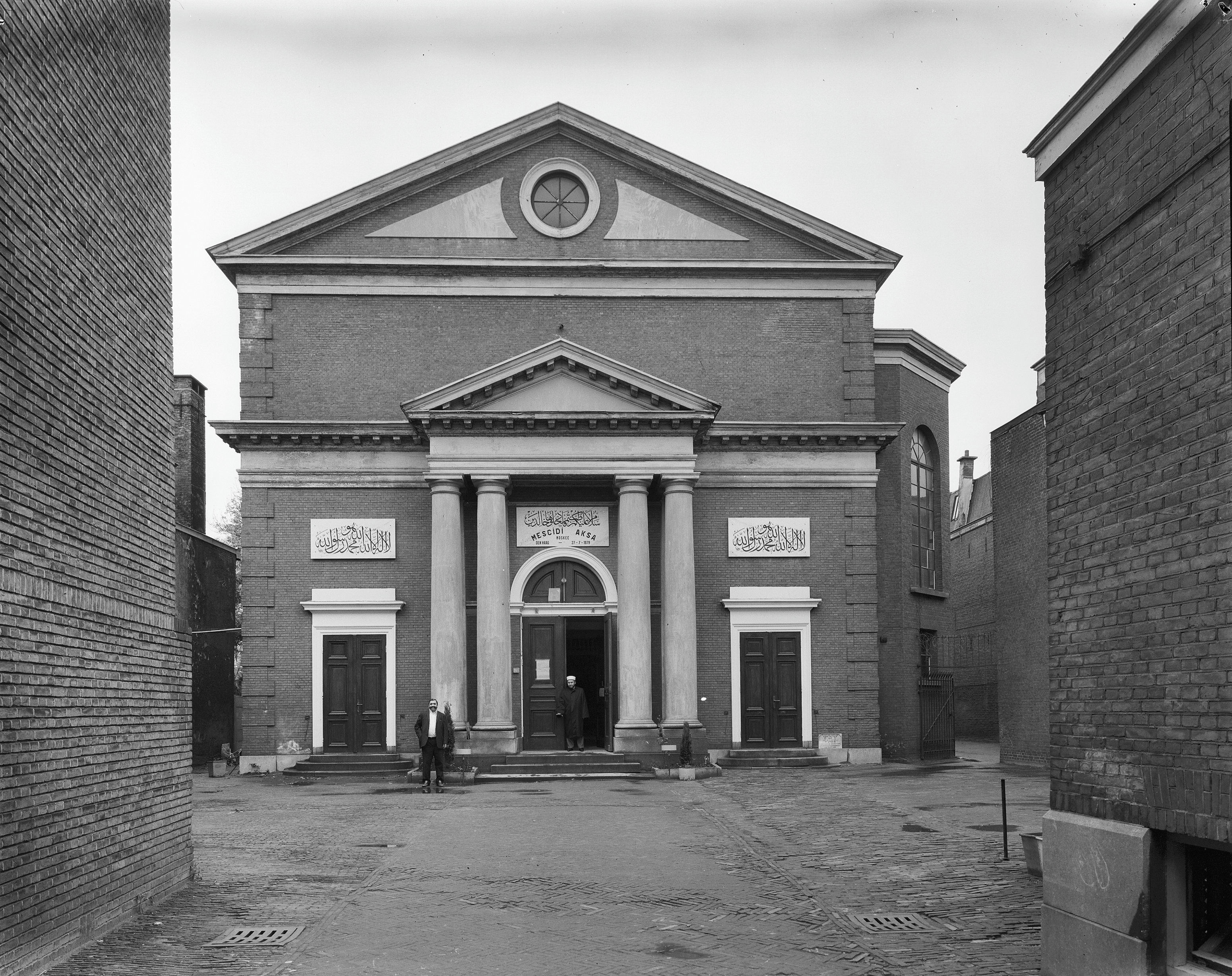 Synagoge: voorgevel